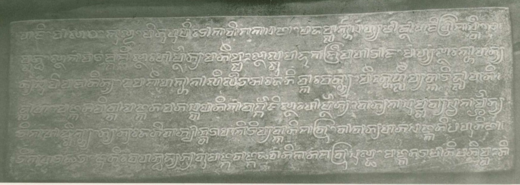 Prasasti Horren, diperkirakan terbit pada abad ke-11.